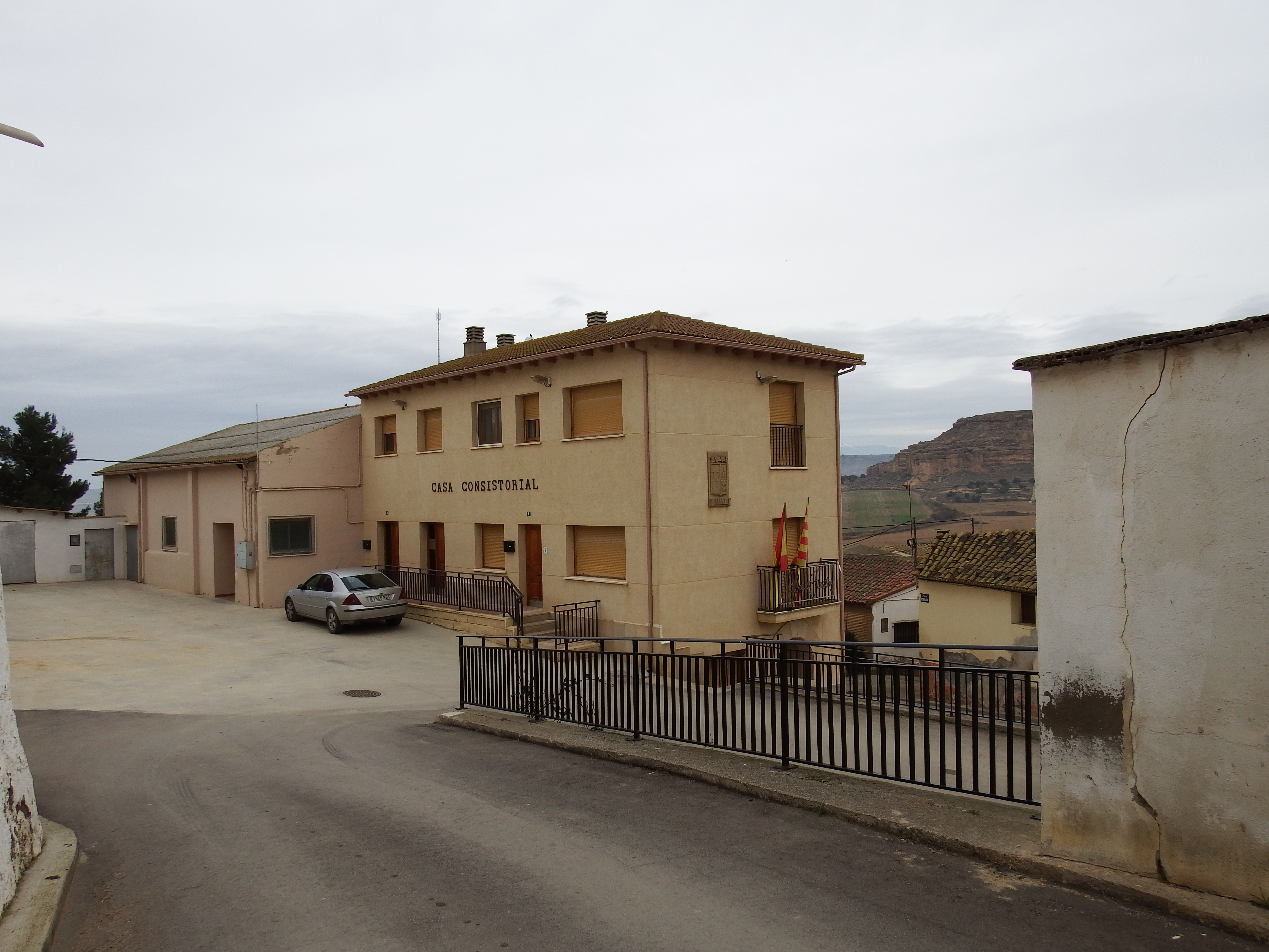 Tramaced, ayuntamiento